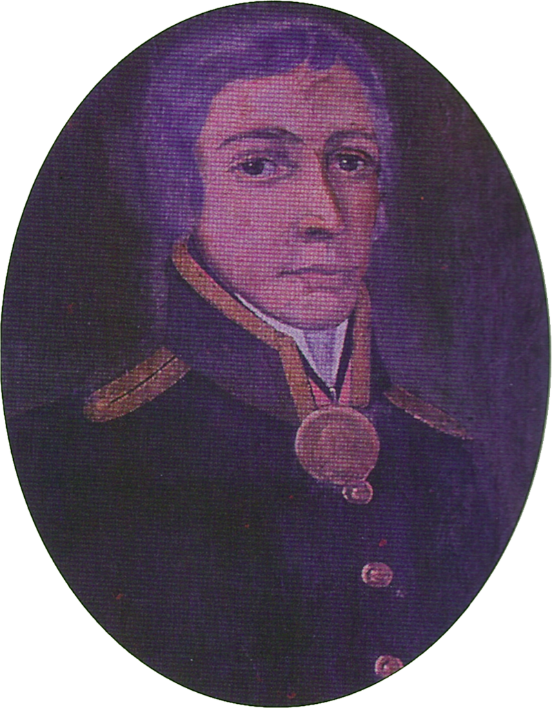 Ivan Alexandrovich Kuskov